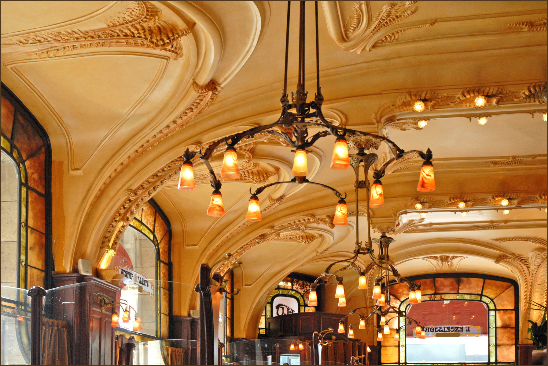 L'hôtel-brasserie Excelsior, ouvert en 1911, est un des fleurons art nouveau de l'Ecole de Nancy. Il a été classé monuments historique en 1976 après avoir failli être démoli lors de l'époque de rénovation du quartier de la gare, menée par des élus et des promoteurs affairistes et incultes. L'immeuble est aujourd'hui transformé en appartements, la brasserie est exploitée par le groupe Flo. Les architectes du bâtiment sont Lucien Weissenburger (1860-1929) et Alexandre Mienville (1876-1959) C'est l'aménagement intérieur de la brasserie qui est le plus caractéristique de l'école de Nancy, tous les grands créateurs nancéiens du début du siècle y ont collaboré et le résultat est un chef d'oeuvre à ne pas manquer ! Les ateliers de Louis Majorelle pour le mobilier et les lustres, les ateliers Daum pour les lampes en pâte de verre, Léopold Wolff pour les sculptures, Jacques Gruber pour les vitraux, et d'autres encore.